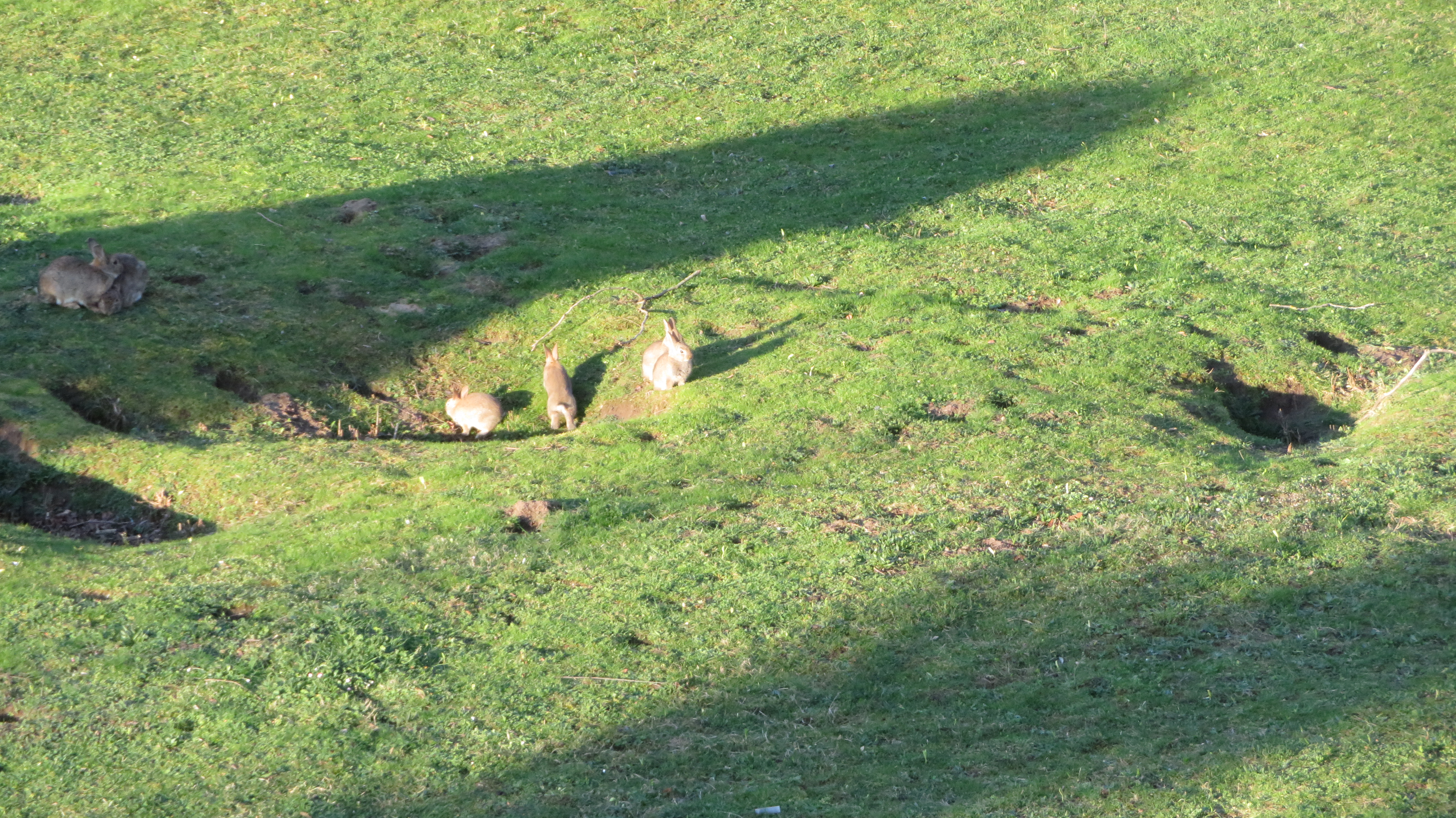 Im Frühjahr folgen die jungen Wildkaninchen ihren Eltern aus dem Bau